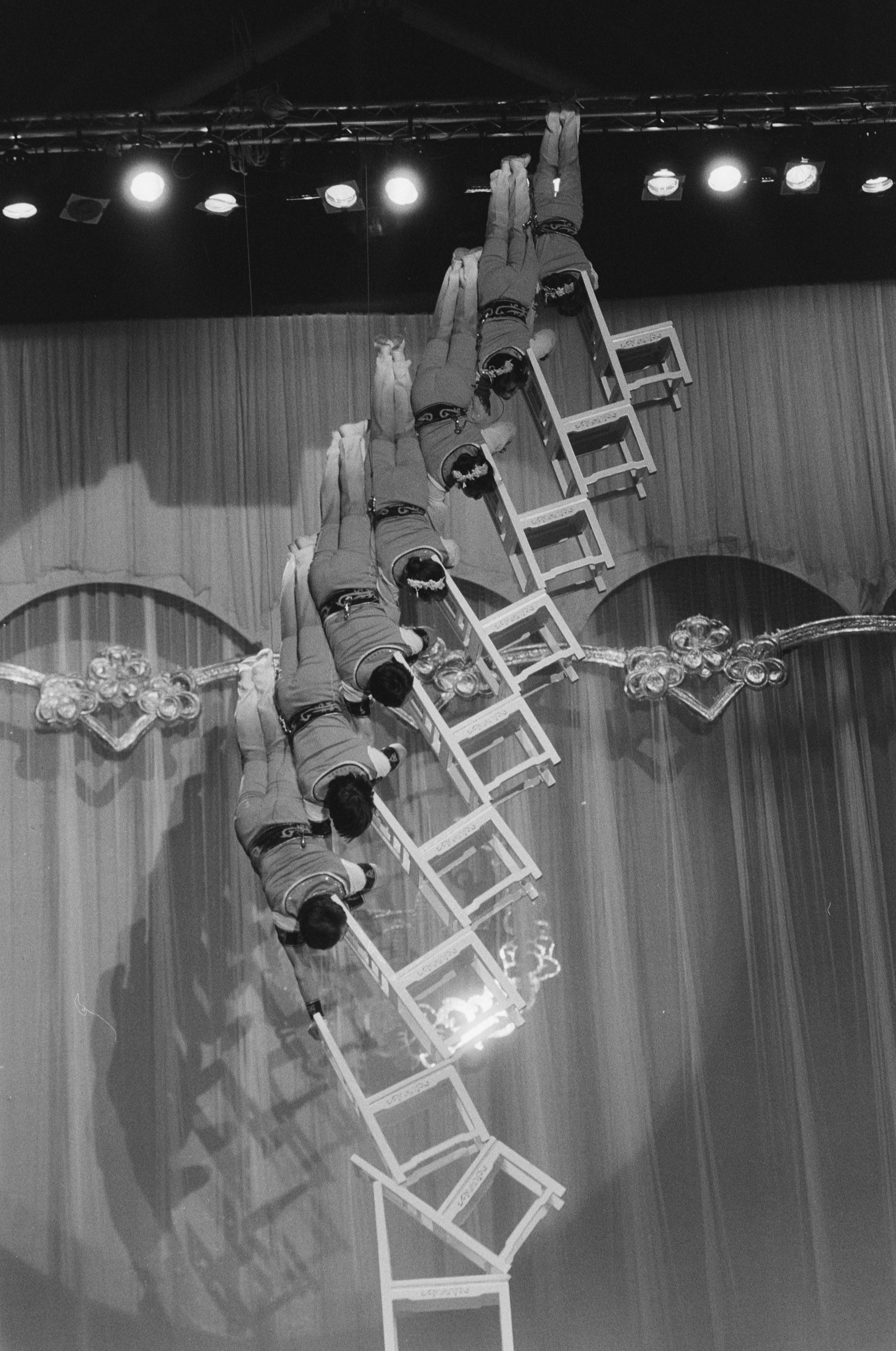 Collectie / Archief : Fotocollectie Anefo Reportage / Serie : [ onbekend ] Beschrijving : Chinees staatscircus in Amsterdam Datum : 29 juni 1987 Locatie : Amsterdam, Noord-Holland Trefwoorden : staatscircussen Fotograaf : Molendijk, Bart / Anefo Auteursrechthebbende : Nationaal Archief Materiaalsoort : Negatief (zwart/wit) Nummer archiefinventaris : bekijk toegang 2.24.01.05 Bestanddeelnummer : 934-0237